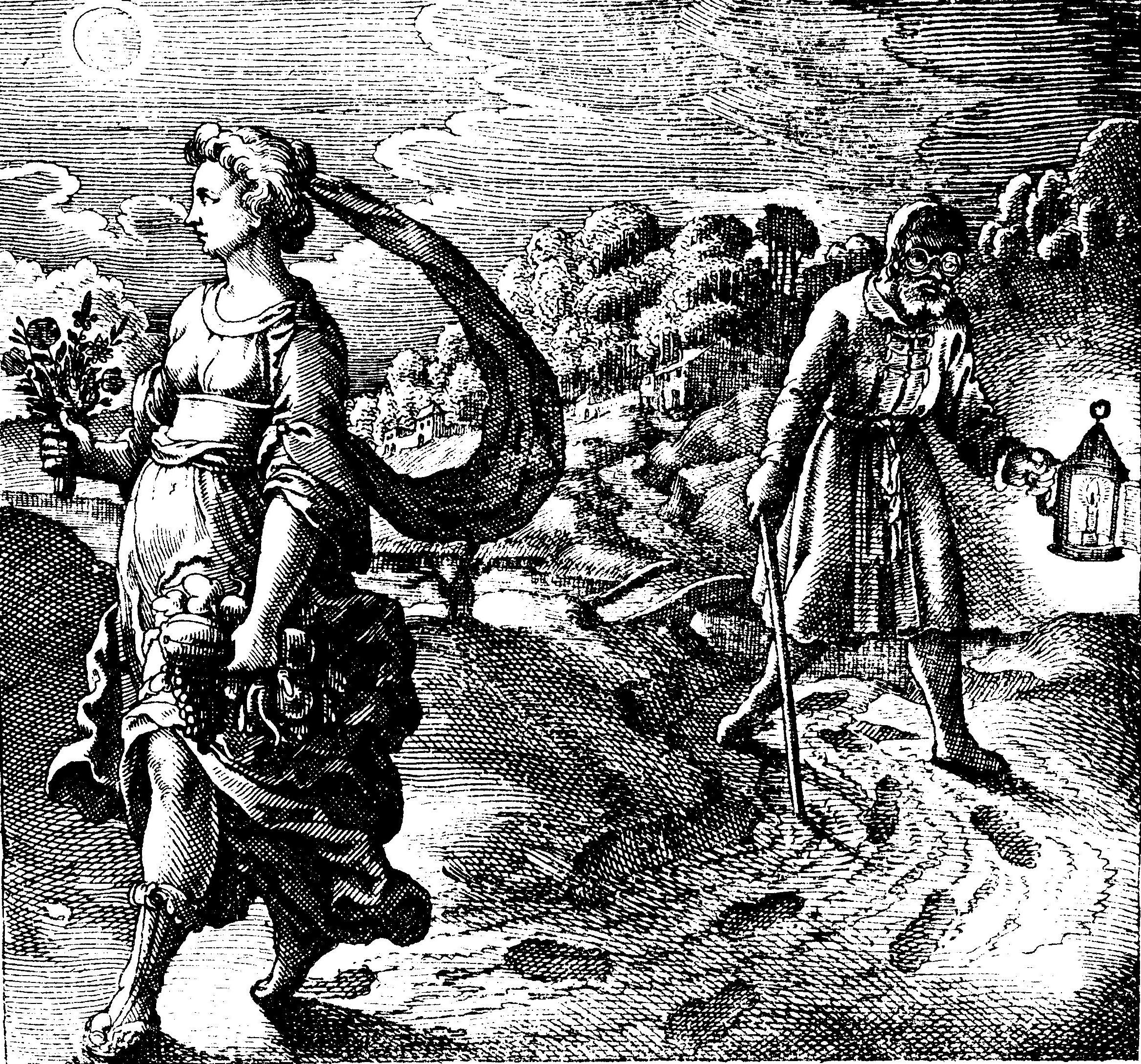 Emblem XLII aus dem Buch "Atalanta Fugiens" von Michael Maier. Frankfurt 1618.